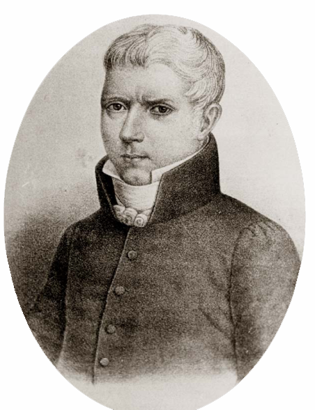 La imagen de Bernardo de Vera y Pintado, pertenece al proyecto El Diputado Bernardo Ohiggins en el Congreso de 1811.djvu